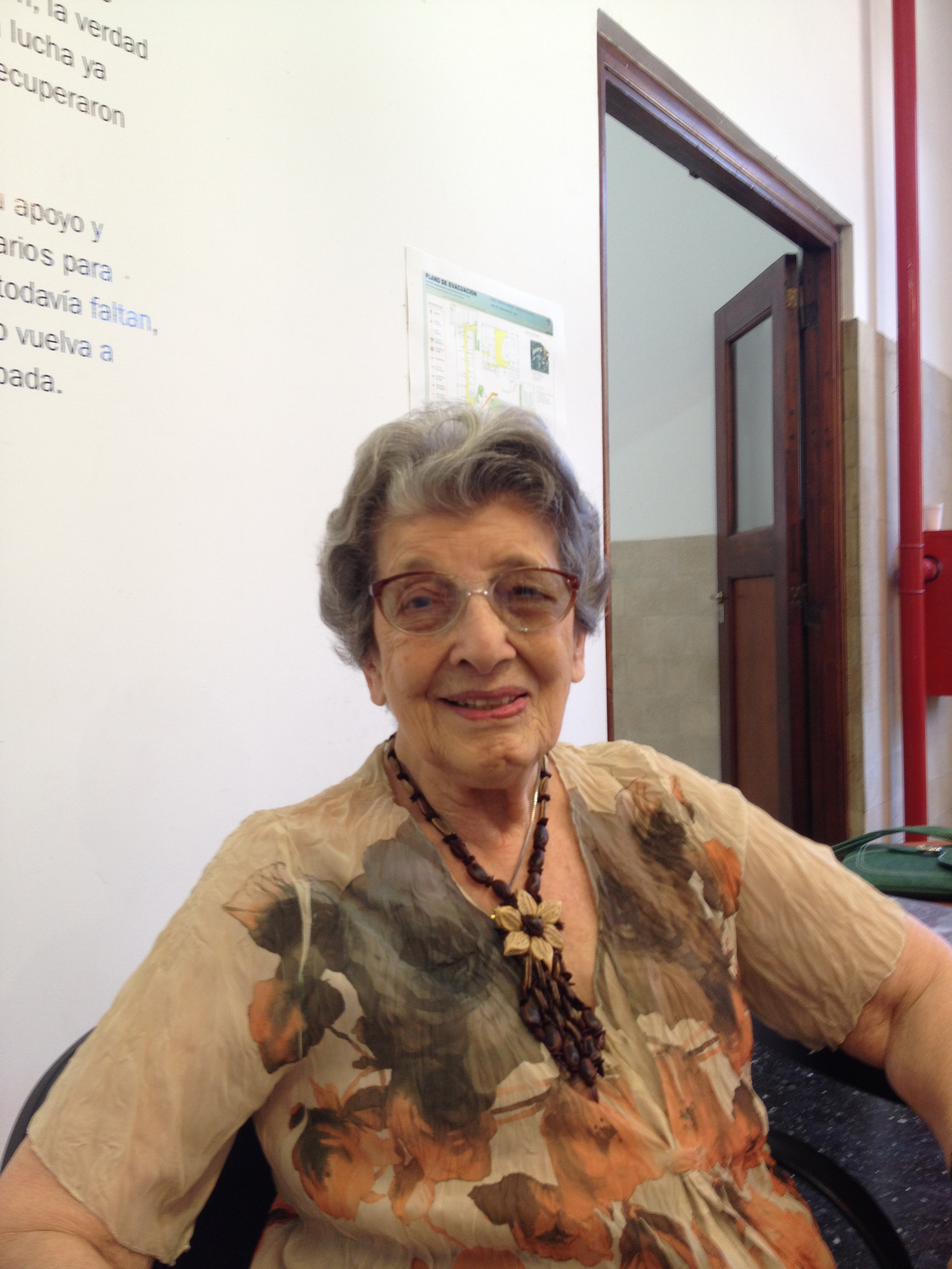 Delia Giovanola, una de las abuelas fundadoras de las Abuelas de Plaza de Mayo en 2015, durante el Editatón en la Casa por la Identidad.